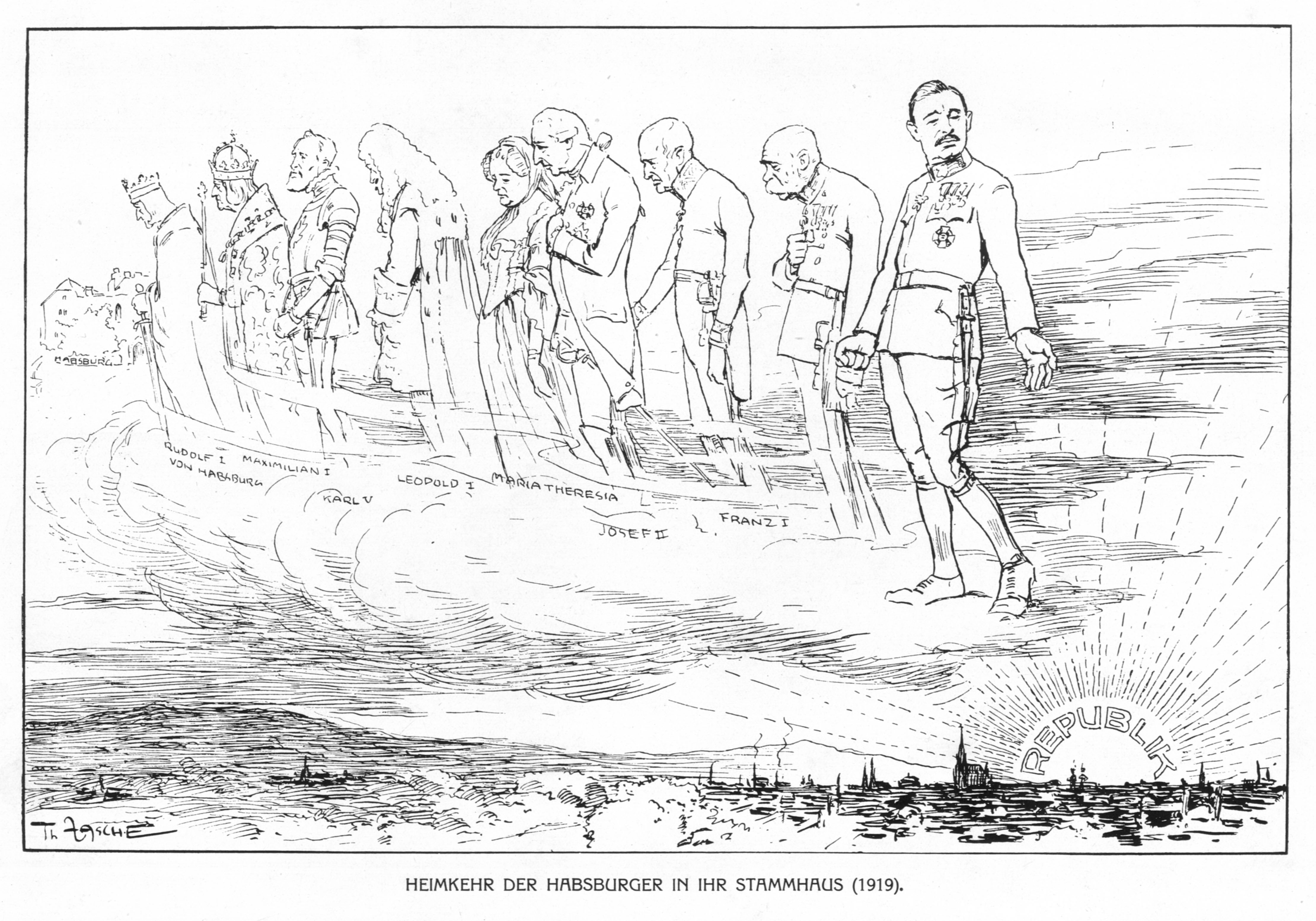 Karikatur